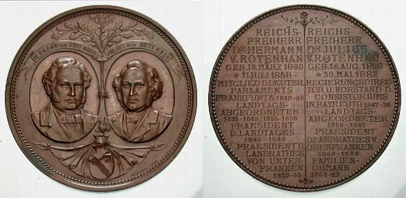 Bronze-Medaille 1882 (v.Börsch) auf Dr. Hermann und Dr. Julius von Rotenhan (Brustbilder und Lebensdaten mit politischem Werdegang). J.u.F. 1171, Gebhardt 149. 55,3mm,69,2gr., Auflage: 90 Stück.